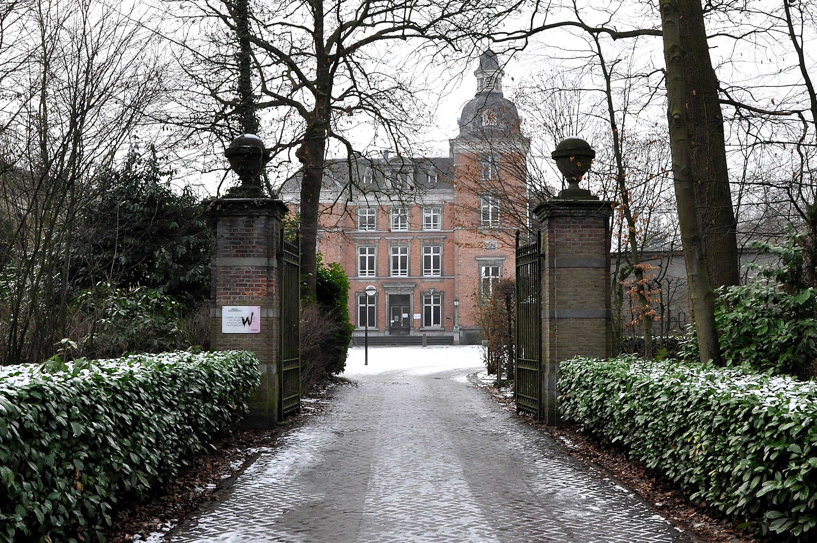 het Braemkasteel te Gentbrugge, België